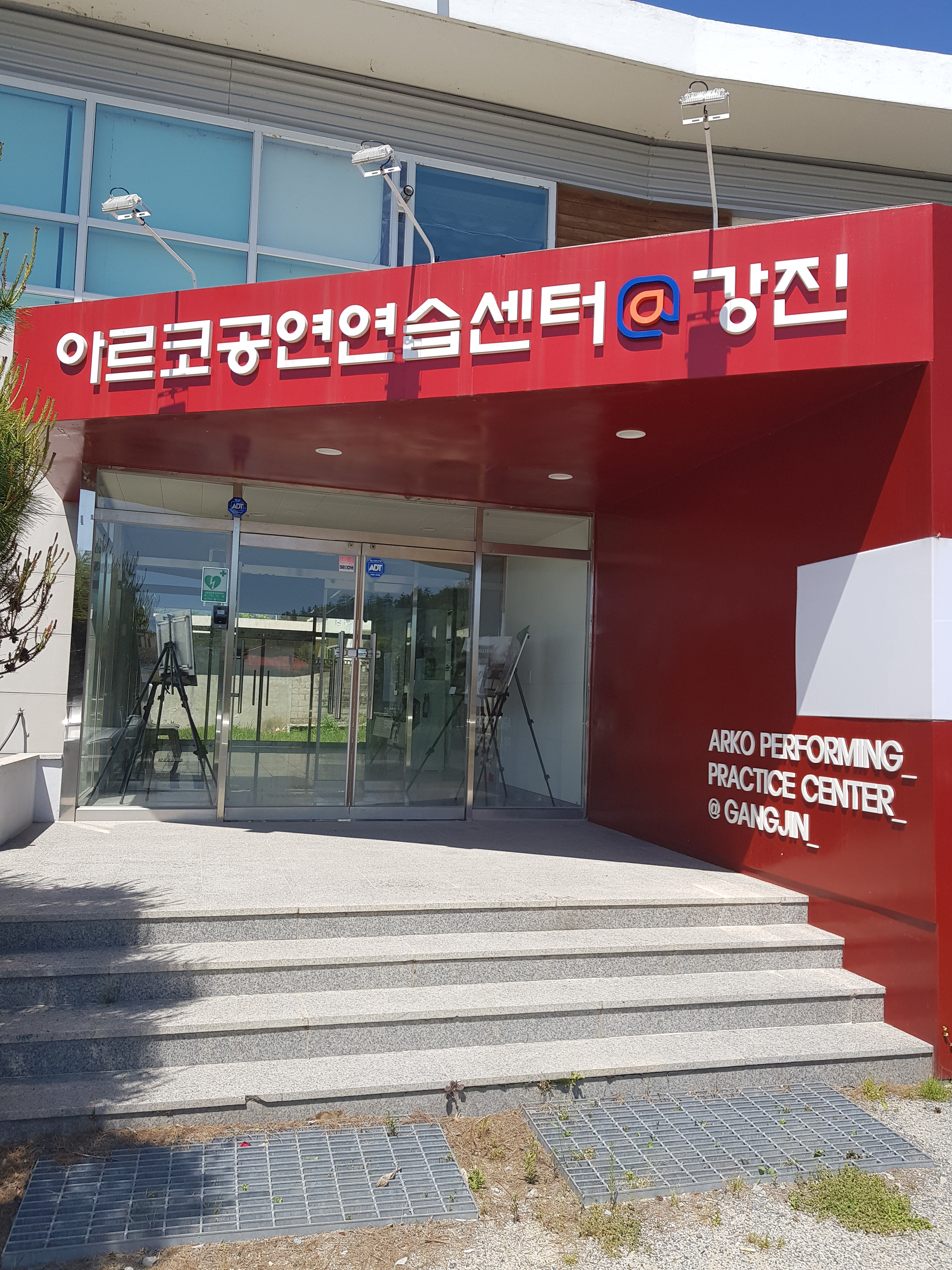 강진 아르코 공연연습센터의 출입구 사진